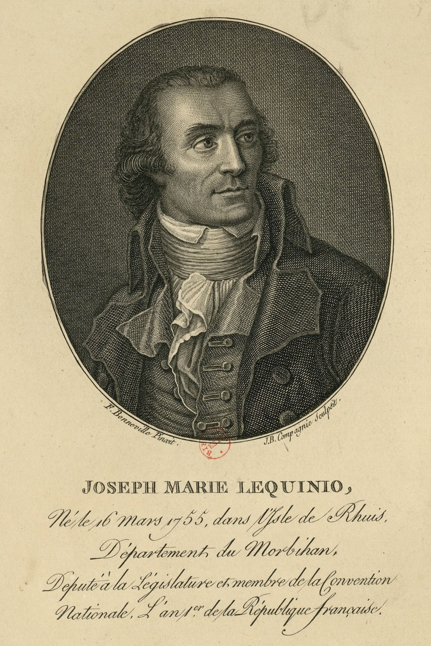 Portrait de Joseph Lequinio, gravé par Jean-Baptiste Compagnie d'après un dessin de François Bonneville.